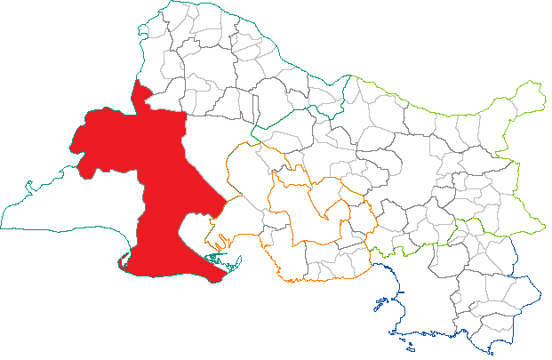 situation de la commune d'Arles dans le département des Bouches-du-Rhône